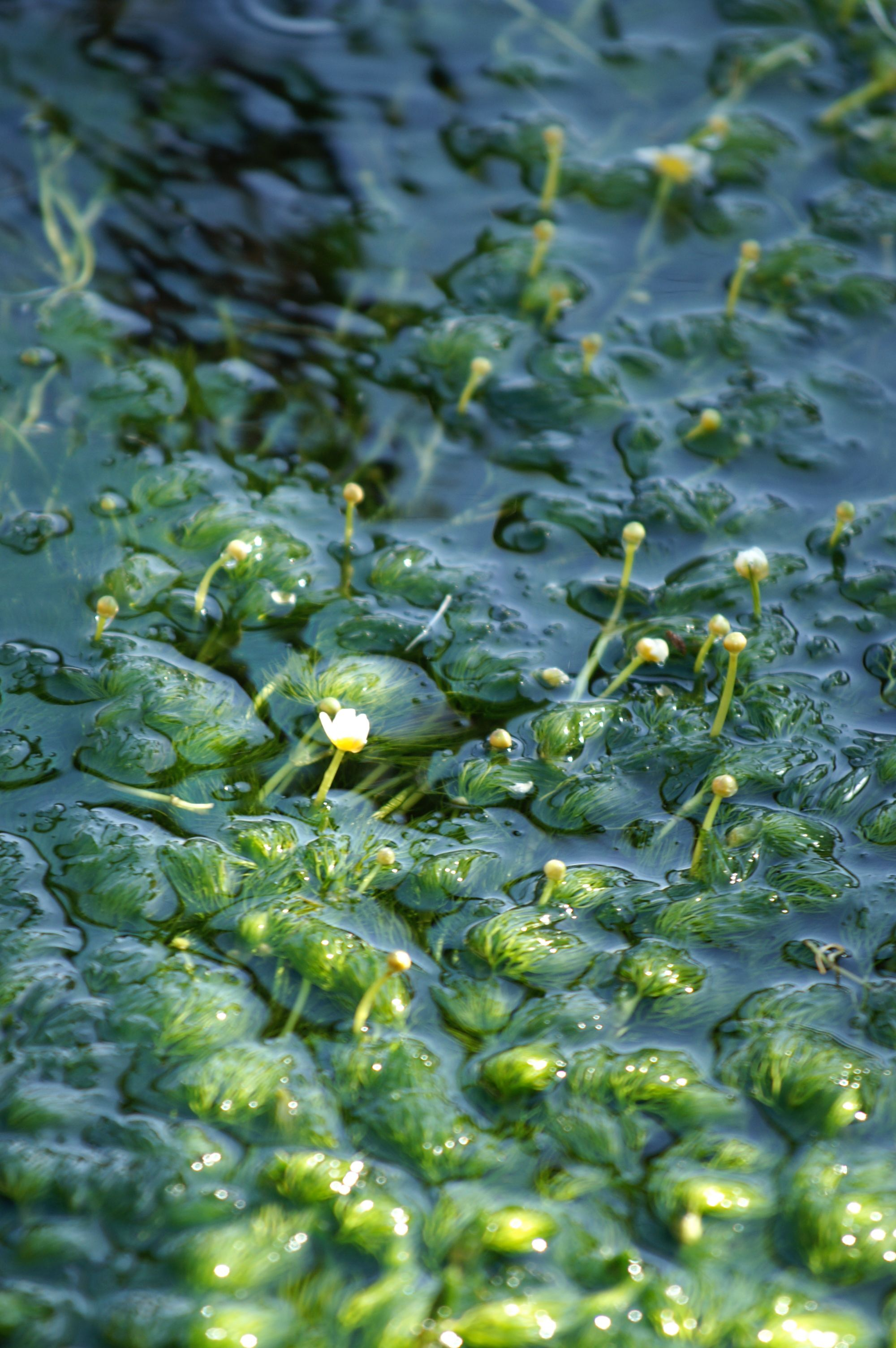 ミシマバイカモ(三島梅花藻)。 (2008/01/25 Mishima, Shizuoka, JAPAN)